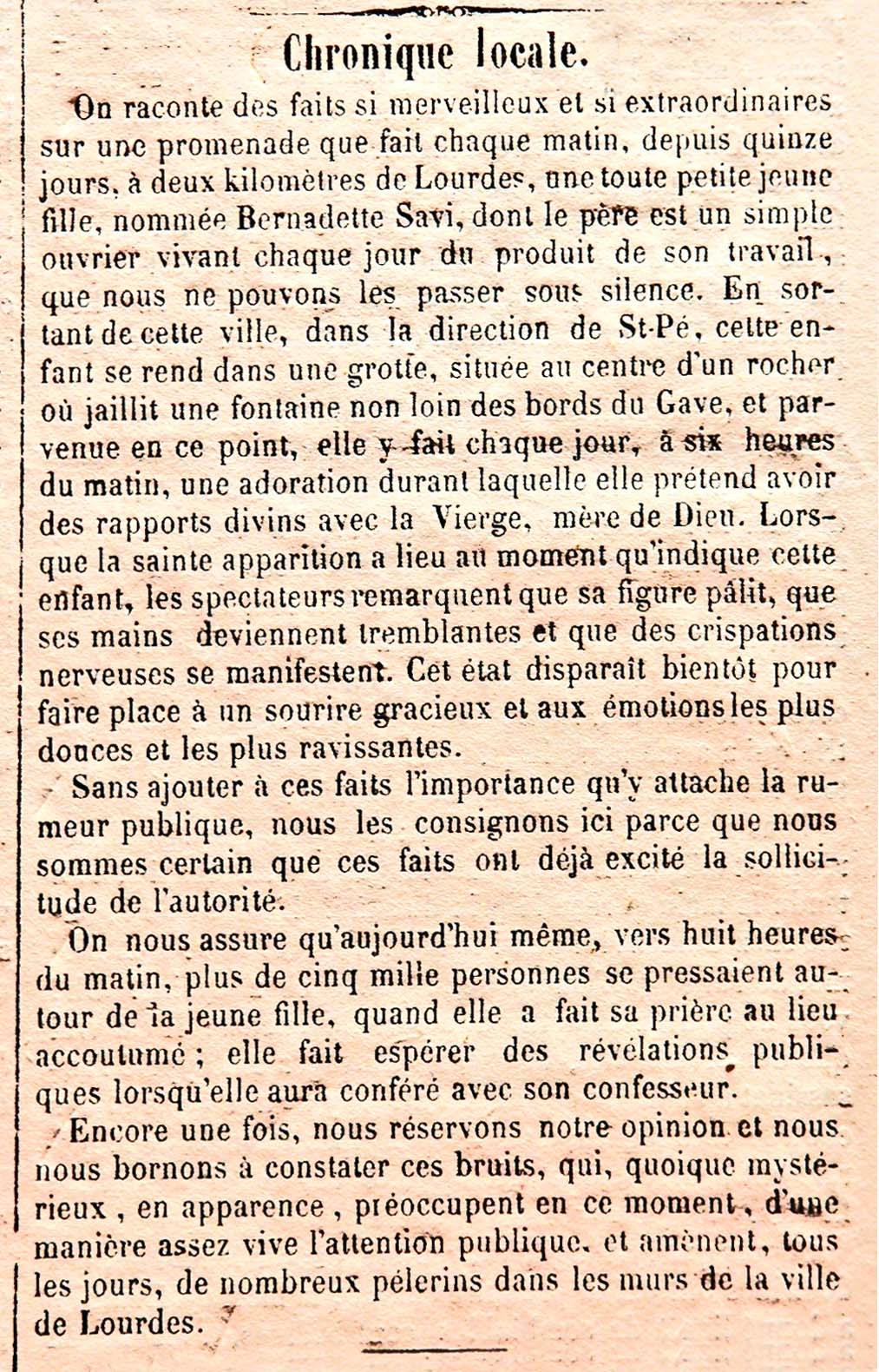 Musée Sainte Bernadette : Article de journal de 1858 "Chronique locale"